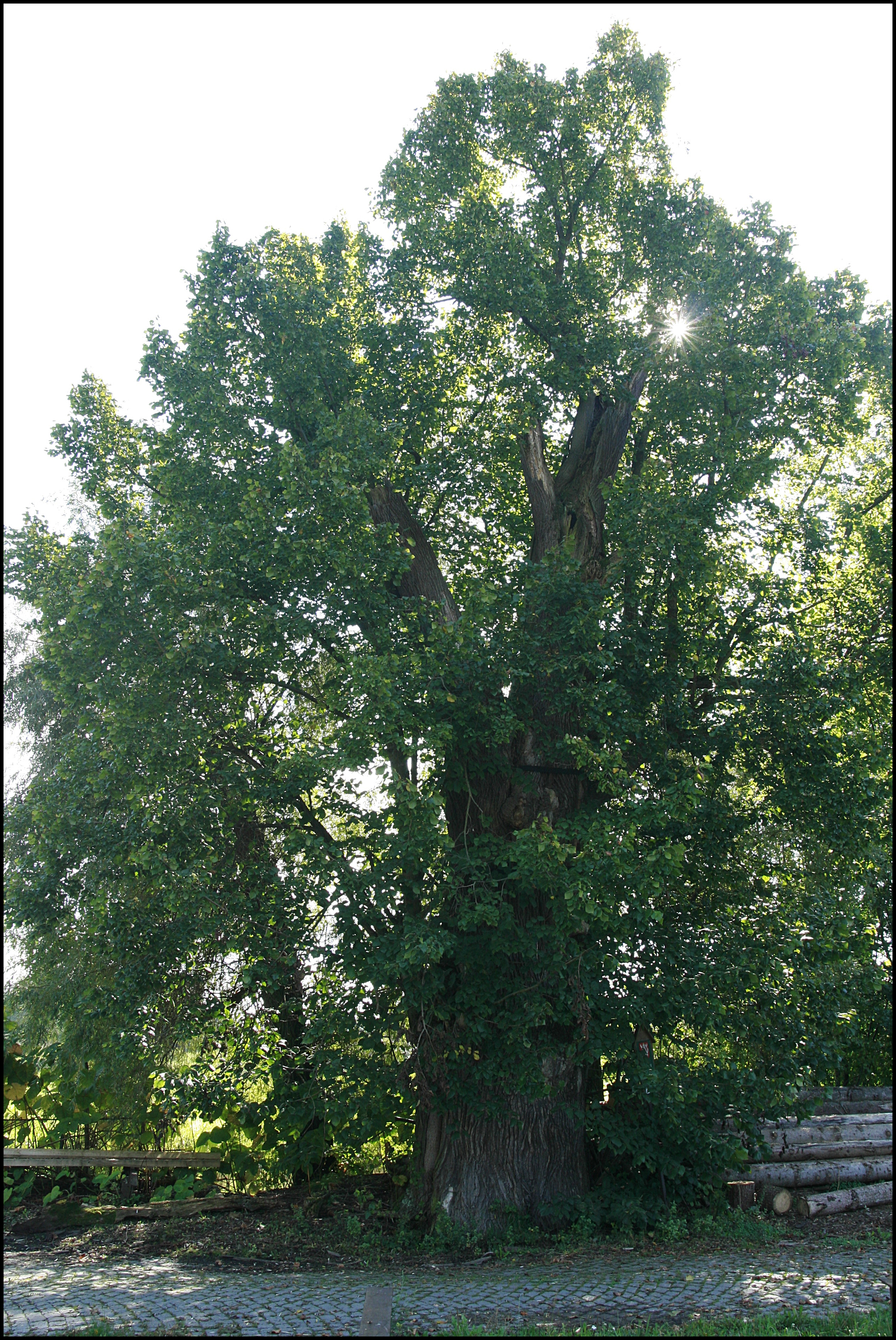 Lípa u náhonu bývalého mlýna